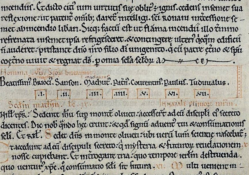 La première mention ds Sept Saints bretons (dans un manuscrit en latin datant de 1275 et connu sous le nom de "Manuscrit latin") transcrits dans l'ordre Brieuc [Brioci], Samson, Malo [Machut], Patern, Corentin, Paul [Pol], Tugdual [Tuduualus] (Manuscrit 5275 de la Bibliothèque nationale de France).